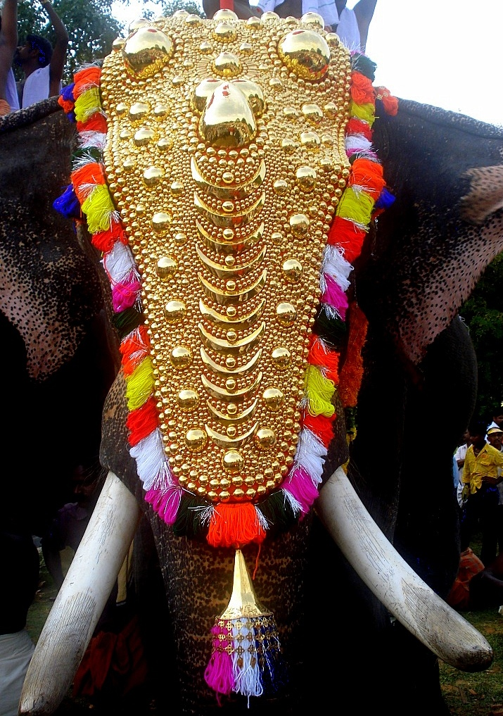 നെറ്റിപ്പട്ടം